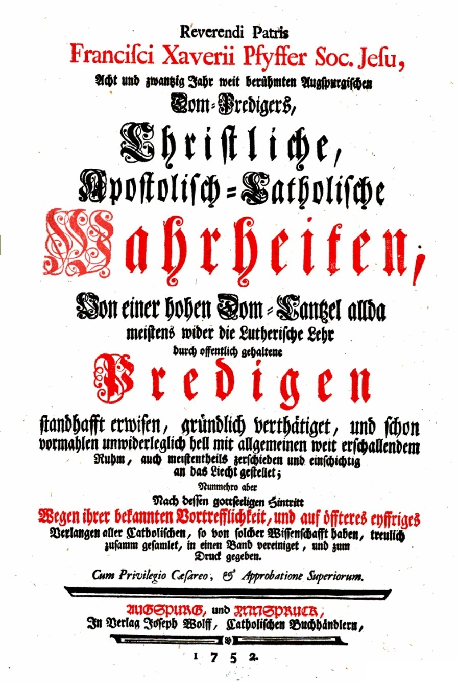 Postume Ausgabe der Predigten des Augsburger Dompredigers Franz Xaver Pfyffer: Reverendi Patris Francisci Xaverii Soc. Jesu, Acht und zwantzig Jahr weit berühmten Augspurgischen Dom-Predigers, Christliche, Apostolisch-Catholische Wahrheiten, Von einer hohen Dom-Cantzel allda meistens wider die Lutherische Lehr durch offentlich gehaltene Predigen standhafft erwisen, gründlich verthätiget, und schon vormahlen unwiderleglich hell mit allgemeinen weit erschallendem Ruhm, auch meistentheils zerschieden und einschichtig an das Liecht gestellet; Nunmehro aber Nach dessen gottseeligen Hintritt Wegen ihrer bekannten Vortrefflichkeit, und auf öffteres, eyffriges Verlangen aller Catholischen, so von solcher Wissenschafft haben, treulich zusamm gesamlet, in einen Band vereiniget, und zum Druck gegeben. Augsburg und Innsbruck 1752